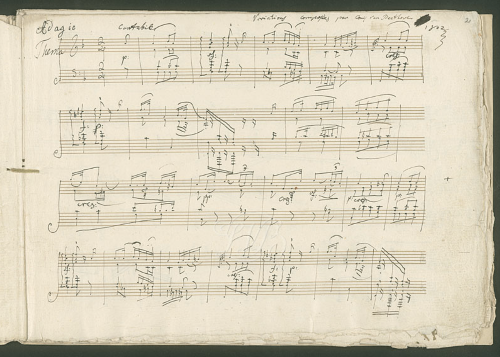 Imagen del manuscrito de las Variaciones op. 34 de Beethoven, con el Tema principal de las variaciones.